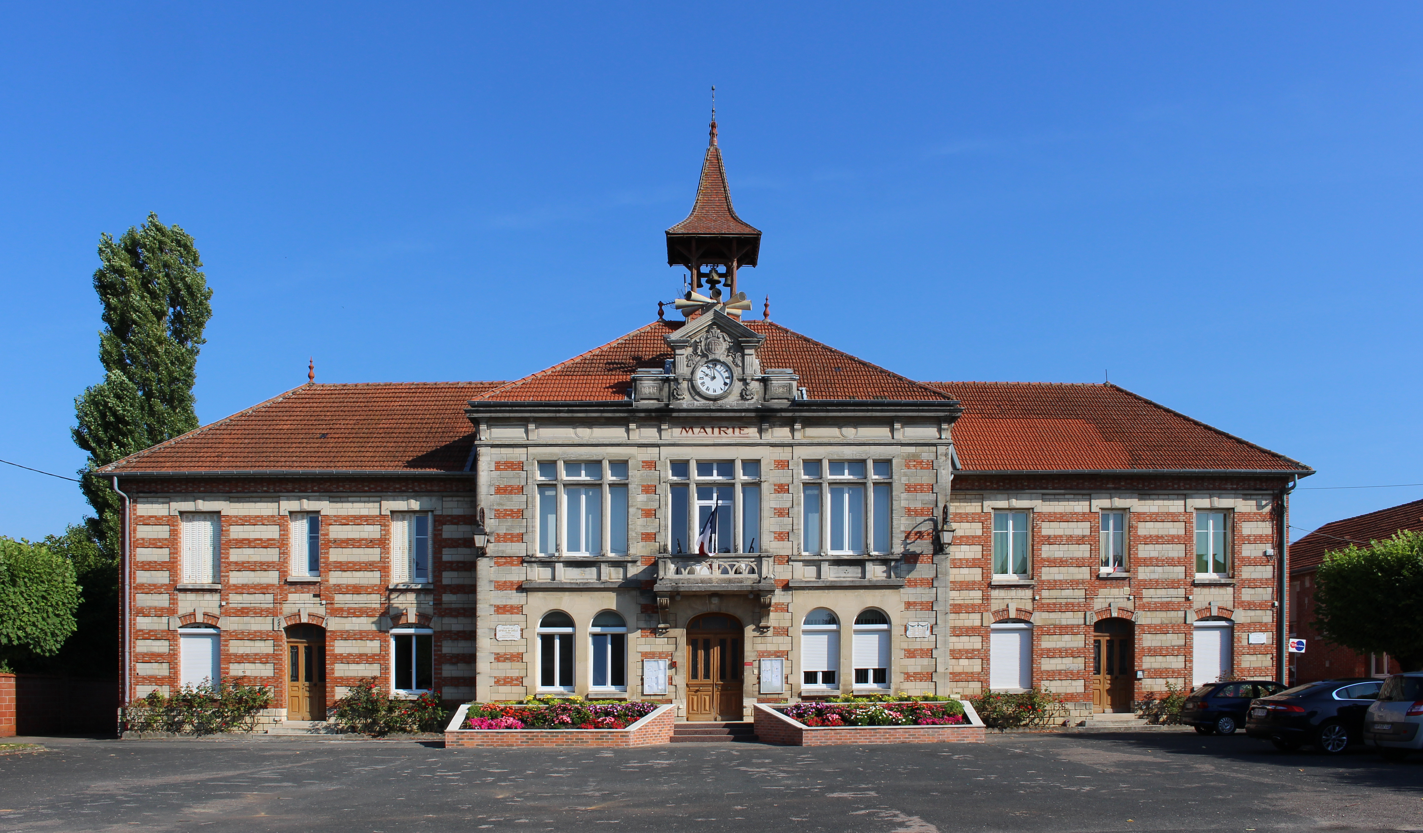 Mairie de Pargny-sur-Saulx.